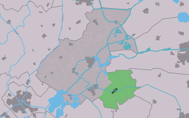 Kaartsje fan himrik fan Aldeboarn